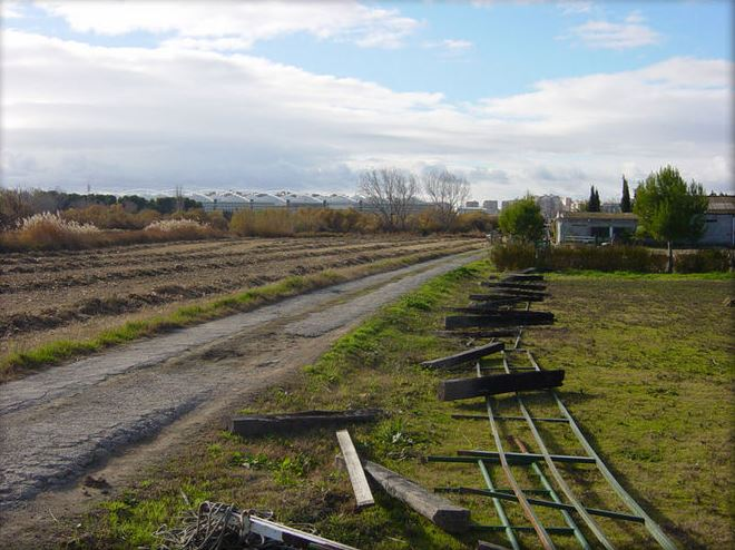 Huerta del meandro de Ranillas antes de las obras de la Expo 2008.